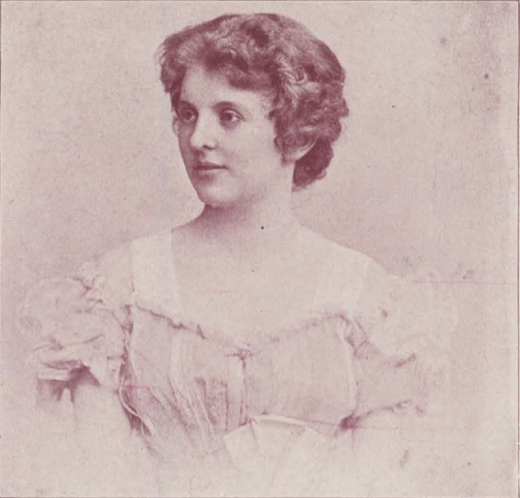 Elsbeth Meyer-Förster, Schriftstellerin und Ehefrau des deutschen Schriftstellers Wilhelm Meyer-Förster (1862-1934).